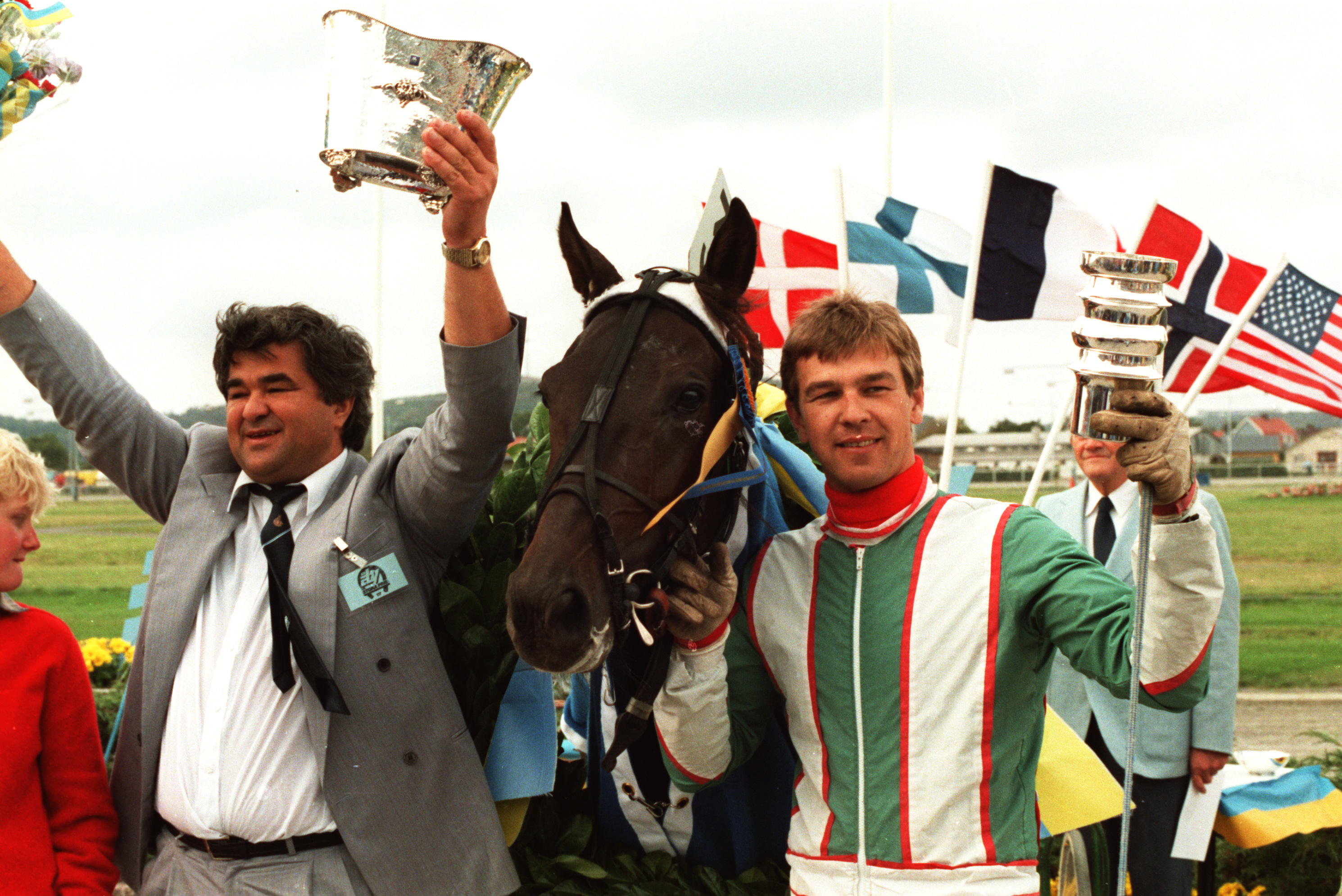 Travaren Legolas med ägaren Marko Anic (till vänster) och kusken Thomas Nilsson i vinnarcirklen efter att ha vunnit Åbys Stora Pris 1983.